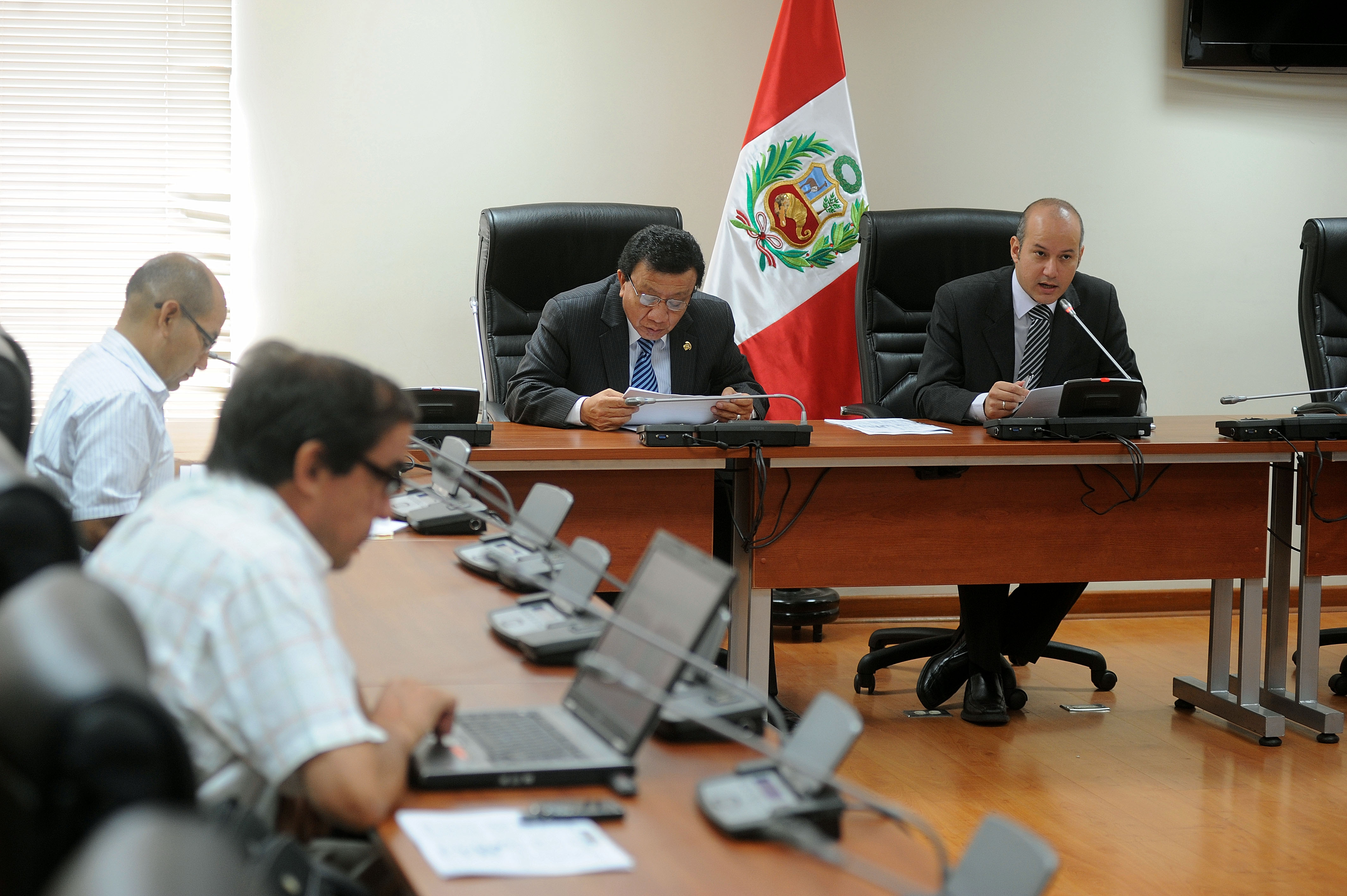 En sesión reservada, conforme a sus acuerdos adoptados desde un comienzo, sesionó esta mañana la Comisión Investigadora Multipartidaria encargada de investigar la gestión gubernamental de Alan García Pérez en el período 2006-2011.